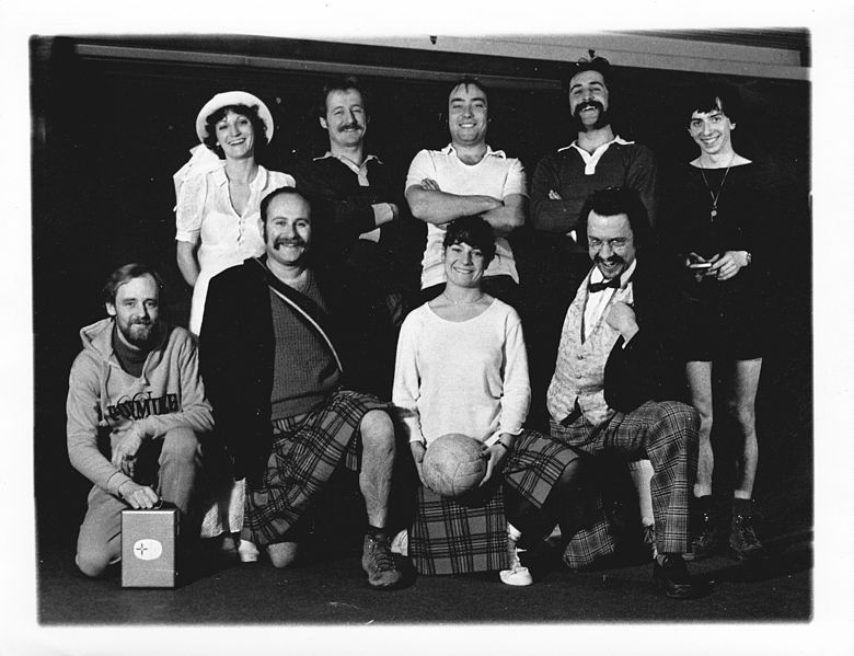 penalty